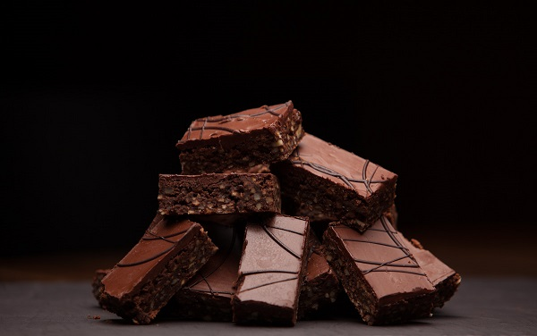 De glutenvrije Choco Brownie van WOODSTONE Pizza and Wine